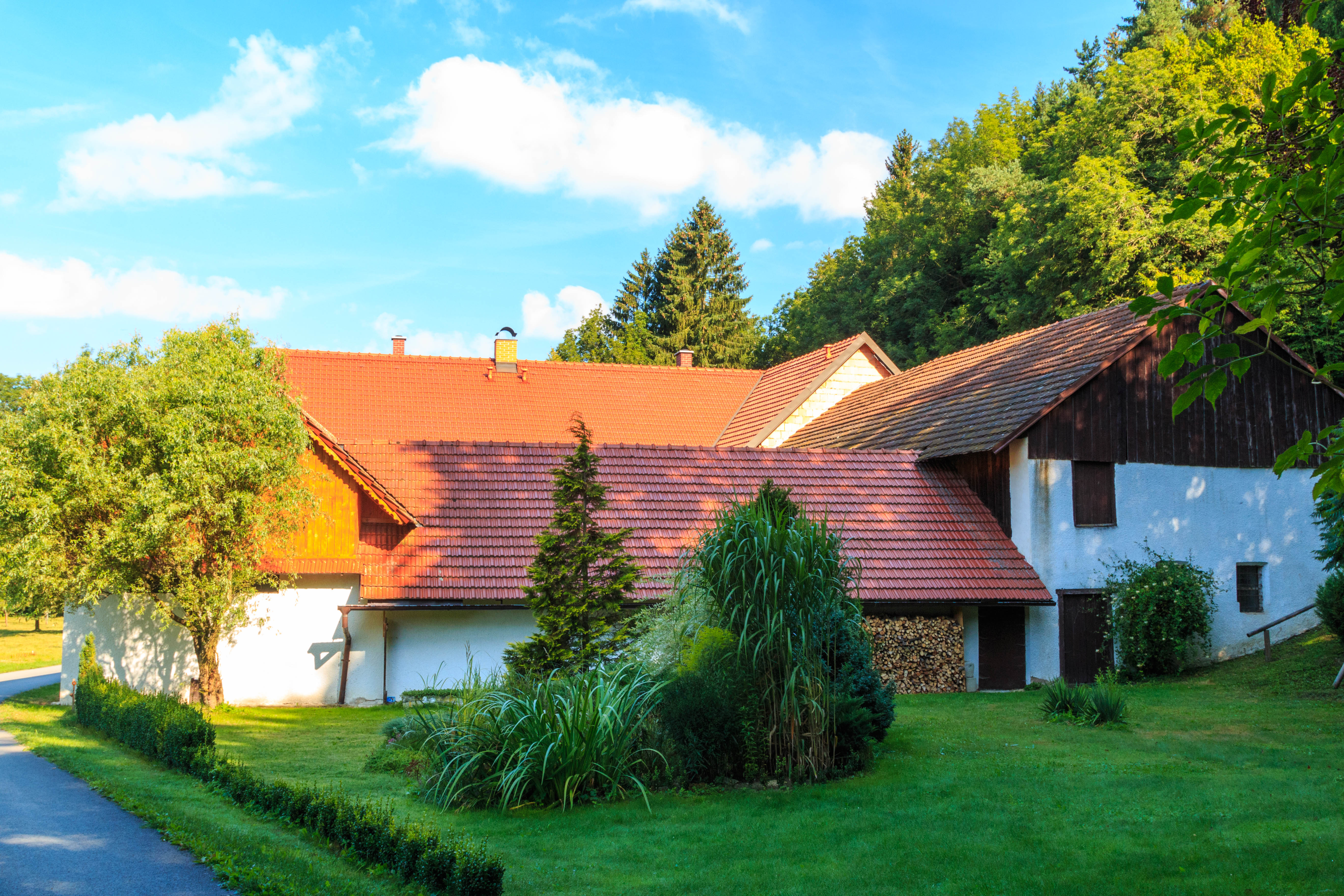 Dolany u Mokré Lhoty - mlýn 02